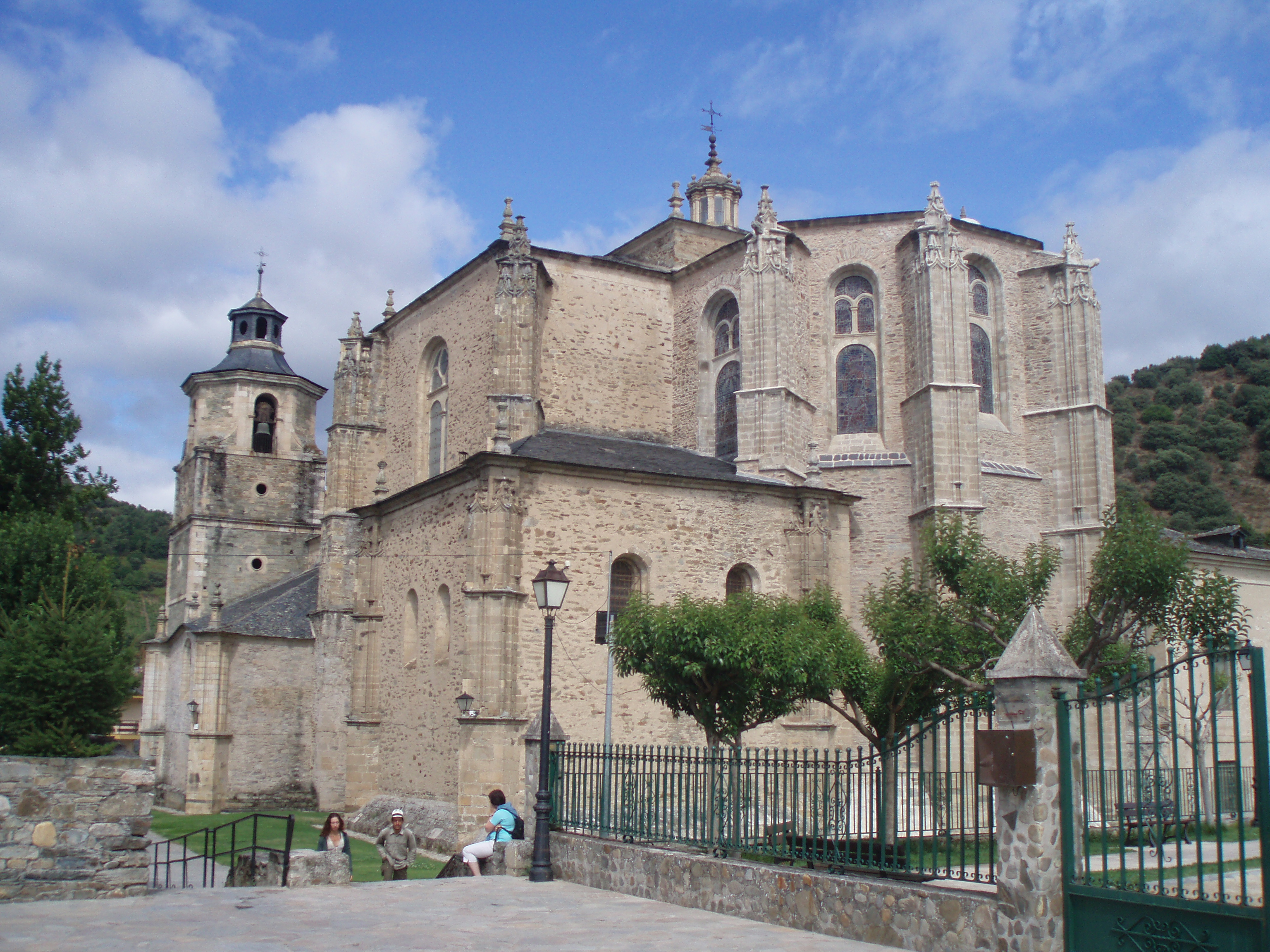 Cabecera de la Colegiata de Santa María de Villafranca del Bierzo.